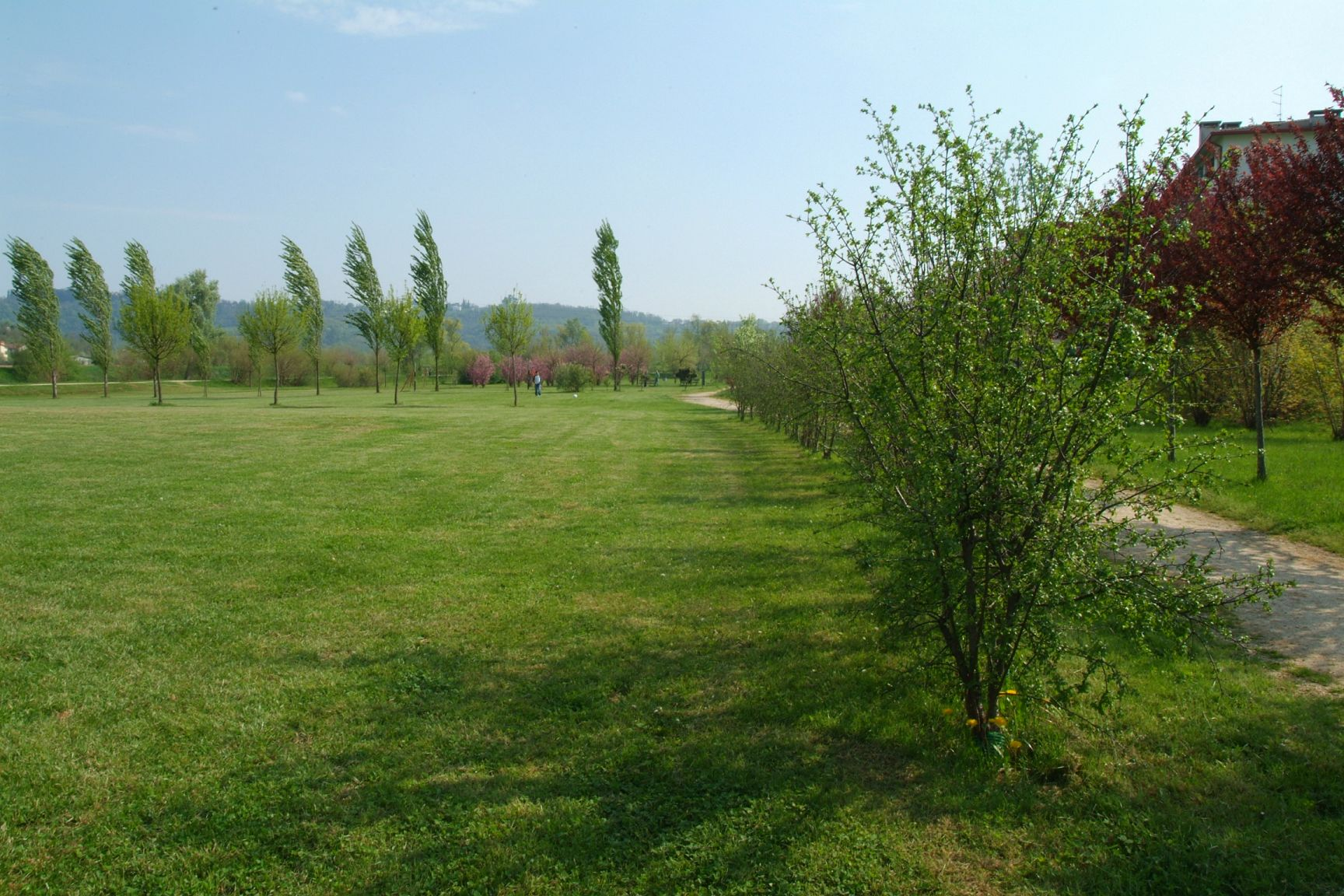 Parco del Retrone